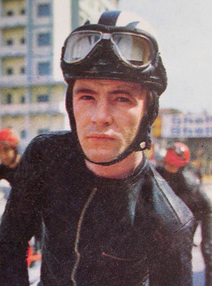 Ángel Nieto 1970/71.